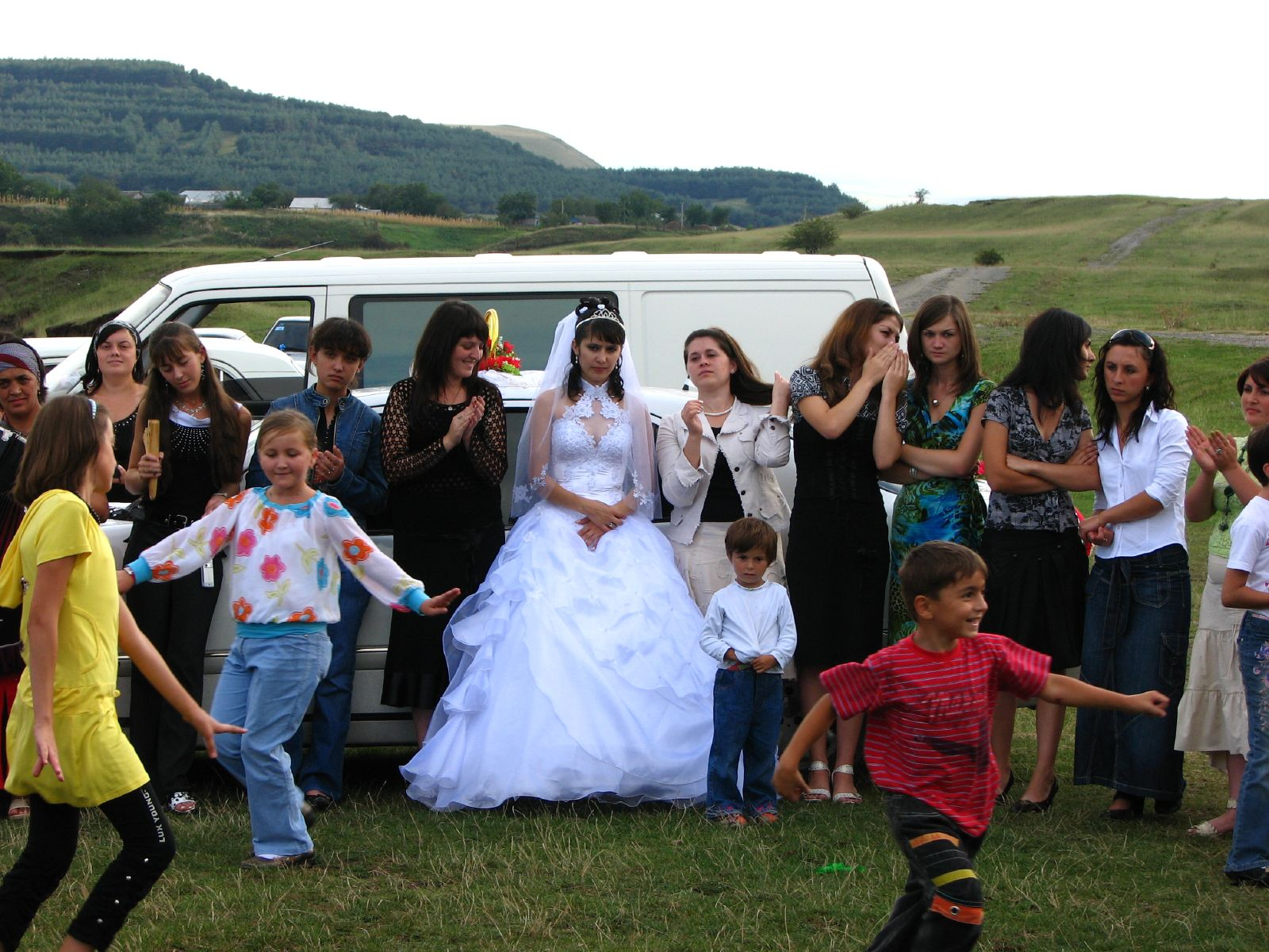 Пляски